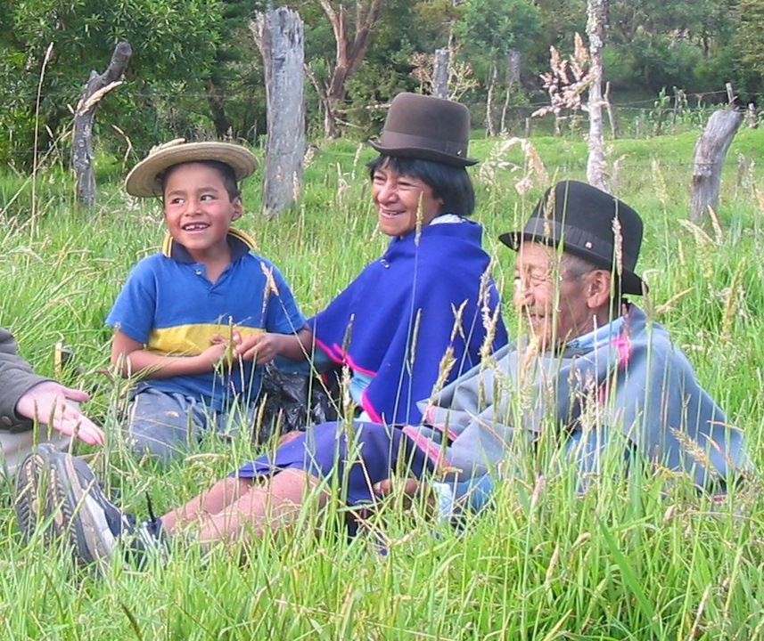 Resguardo indígena de Guambía en Colombia